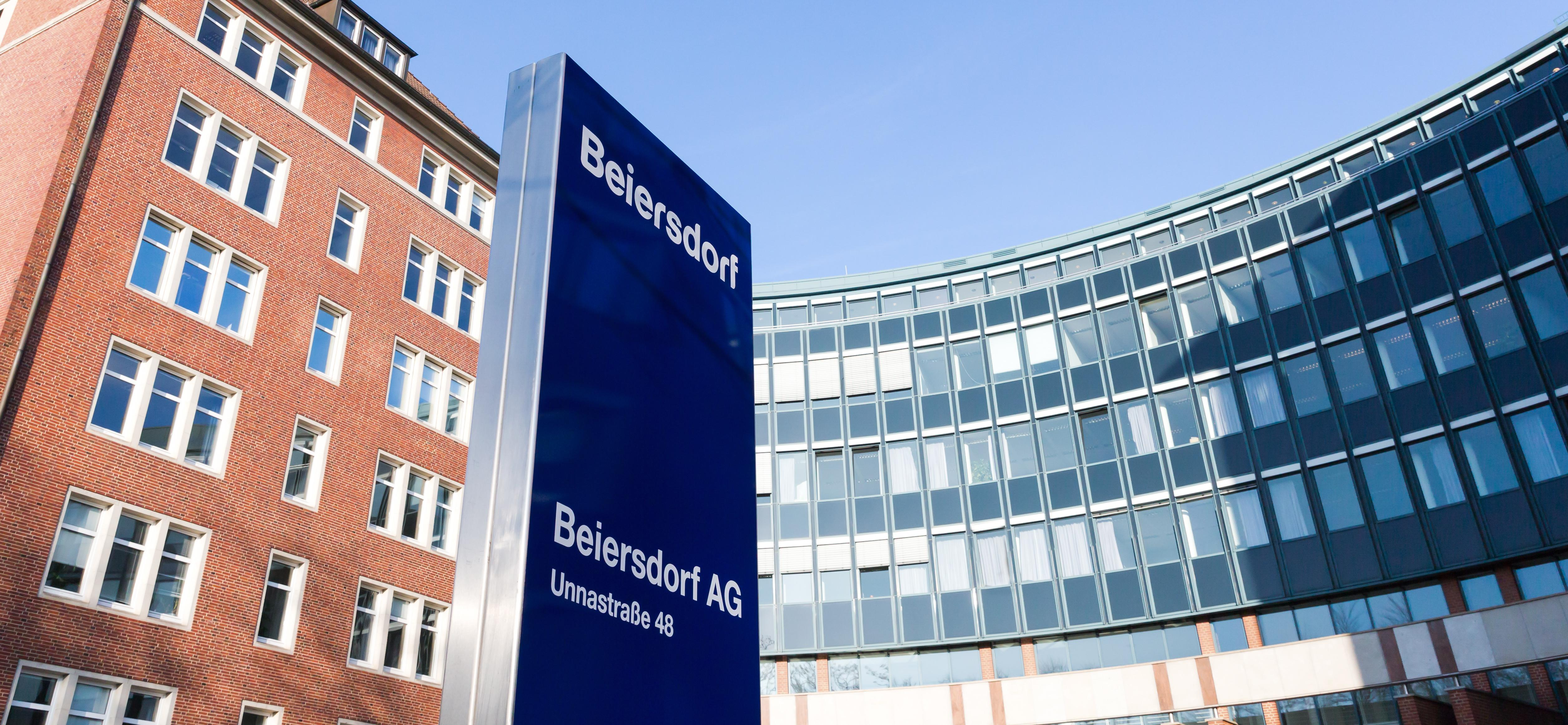 Firmenzentrale Hamburg